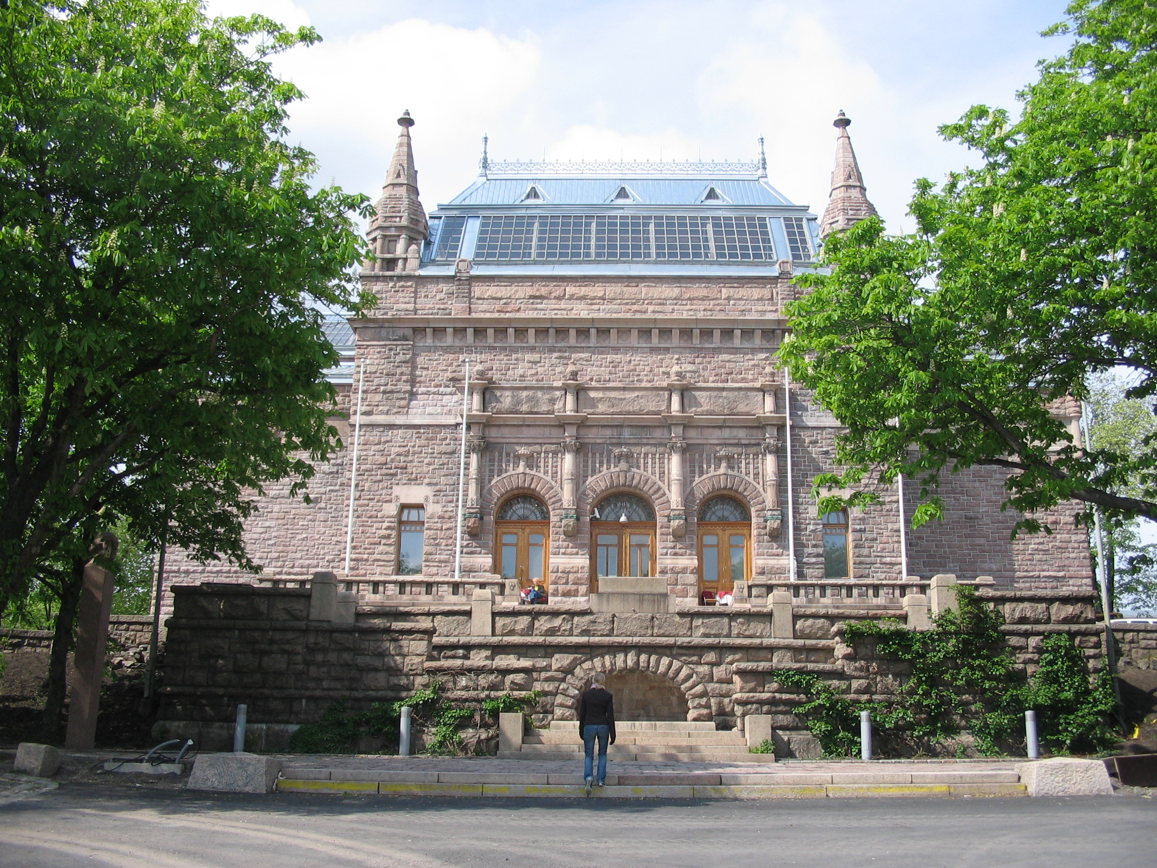 Turku Art Museum